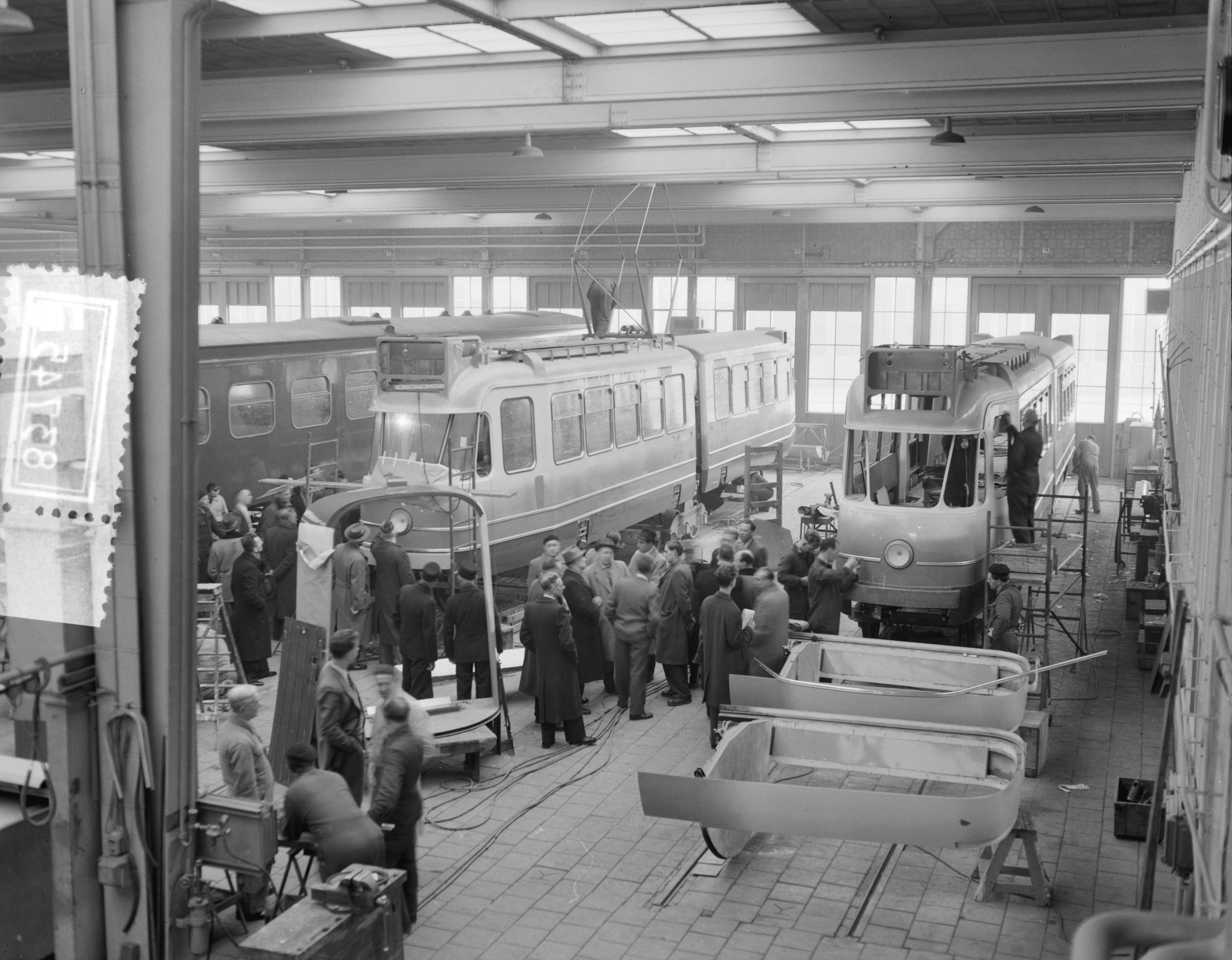 Collectie / Archief : Fotocollectie Anefo Reportage / Serie : [ onbekend ] Beschrijving : Gelede trams in aanbouw voor Amsterdam bij Beynes Datum : 5 maart 1957 Locatie : Amsterdam, Noord-Holland Trefwoorden : TRAMS, aanbouw Persoonsnaam : BEYNES Fotograaf : Rossem, Wim van / Anefo Auteursrechthebbende : Nationaal Archief Materiaalsoort : Negatief (zwart/wit) Nummer archiefinventaris : bekijk toegang 2.24.01.04 Bestanddeelnummer : 908-3745